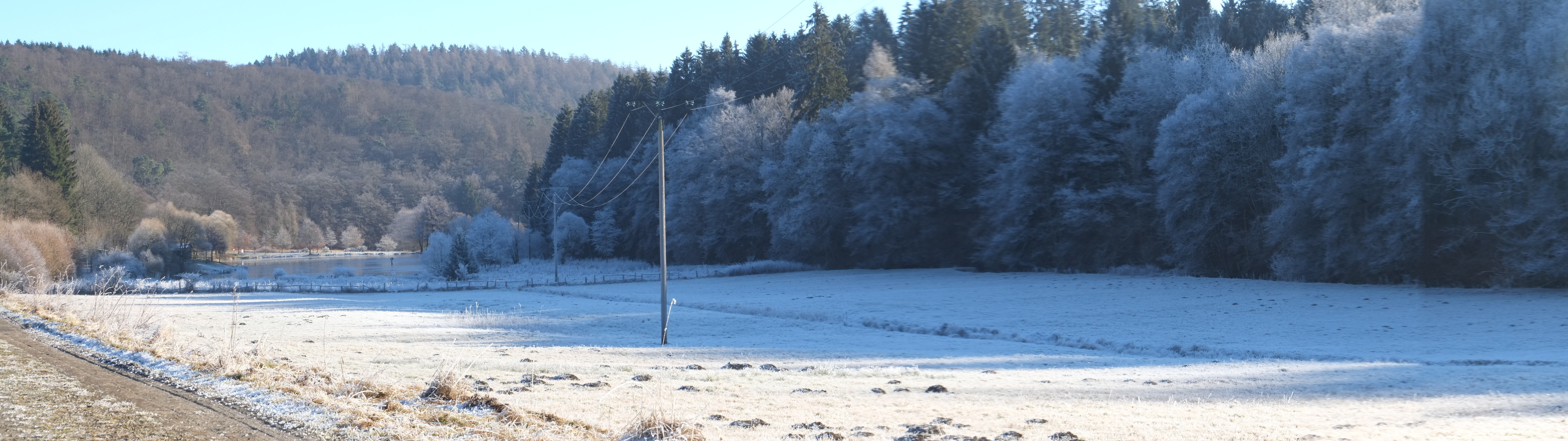 Linsphertal nahe der Oberlinspher Mühle und des Silbersees in Bromskirchen (Hessen, Deutschland) im Winter; Vordergrund bis zum See im Naturschutzgebiet „Oberlauf des Linspherbaches“